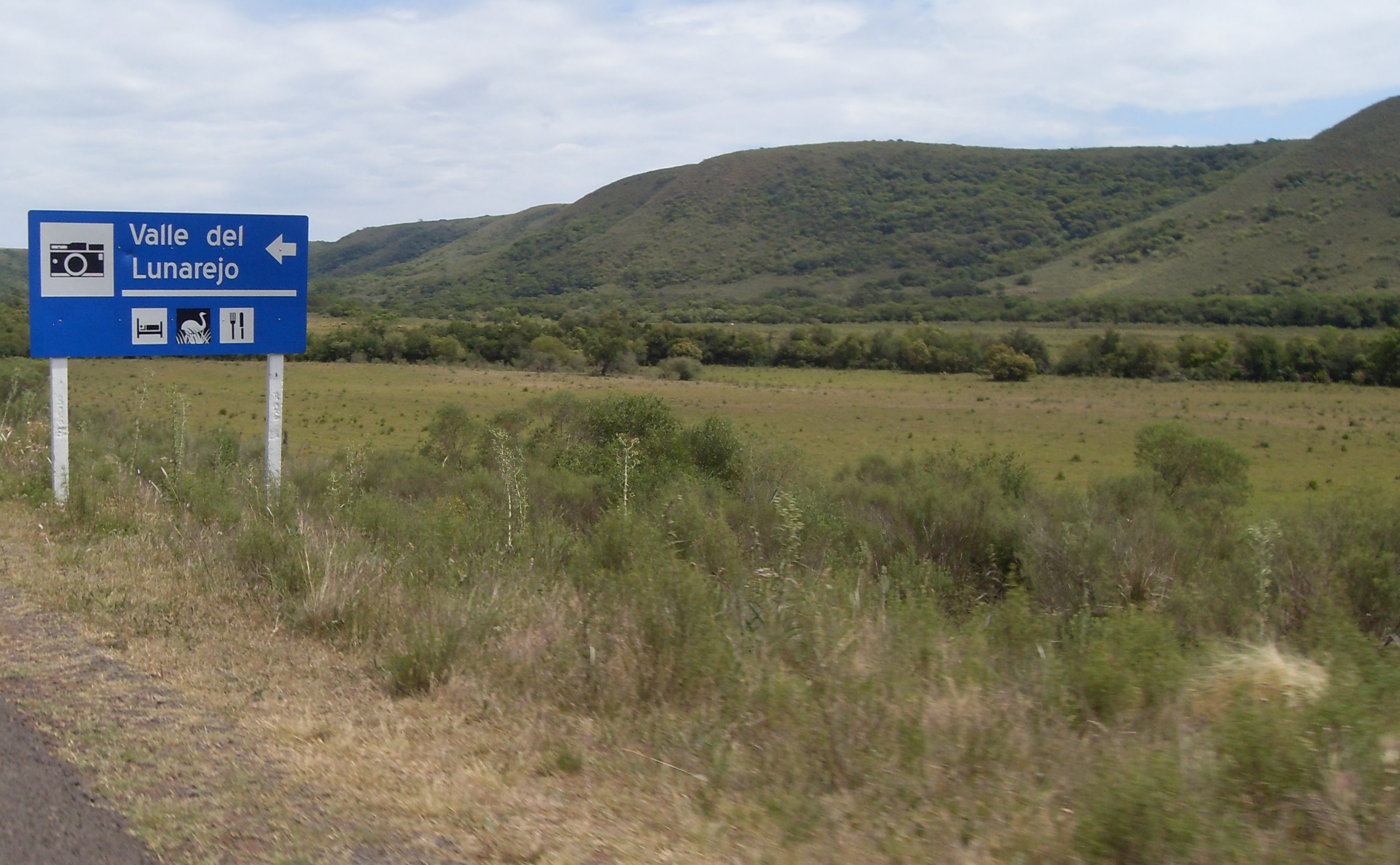 El Paisaje Protegido Valle del Lunarejo se encuentra en el extremo noroeste del departamento de Rivera, muy próximo a Artigas y Salto y del límite contestado con Brasil. Se ubica en la parte norte del sistema de la Cuchilla de Haedo, que cumple una función de corredor biológico para el ingreso de especies subtropicales de flora y fauna del sur de Brasil hacia el territorio uruguayo. Es un área representativa de las Quebradas del Norte o de la Cuesta Basáltica, una región que se destaca por un paisaje de gran belleza, con elementos escénicos únicos en el país, caracterizado por cerros con cimas aplanadas que delimitan estrechos valles modelados por los cursos de agua conocidos como "quebradas". Las quebradas son profundas incisiones entalladas en la roca basáltica, de importantes pendientes y relieve enérgico, donde confluyen cuevas, paredones verticales y saltos de agua y se desarrolla una exuberante vegetación de tipo selvática subtropical.